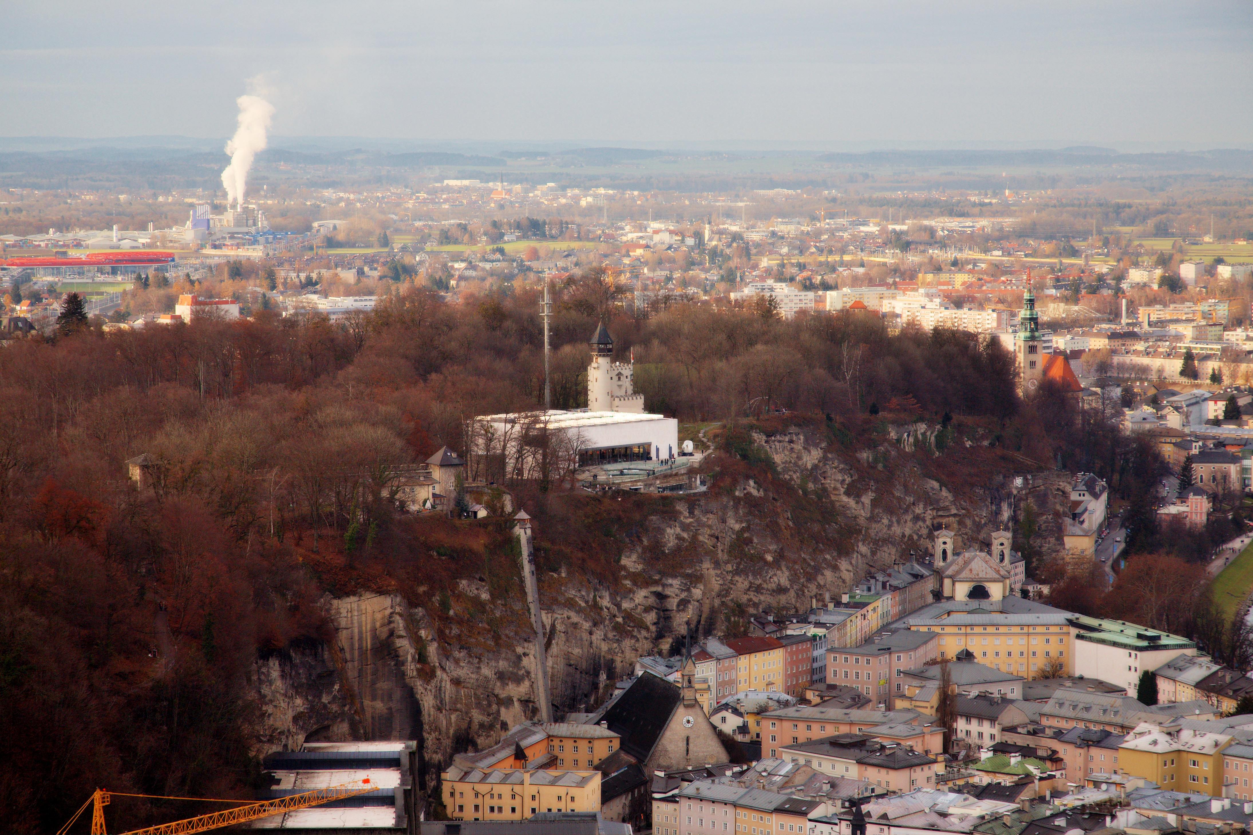 Museum der Moderne am Mönchsberg von der Festung Hohensalzburg aus.